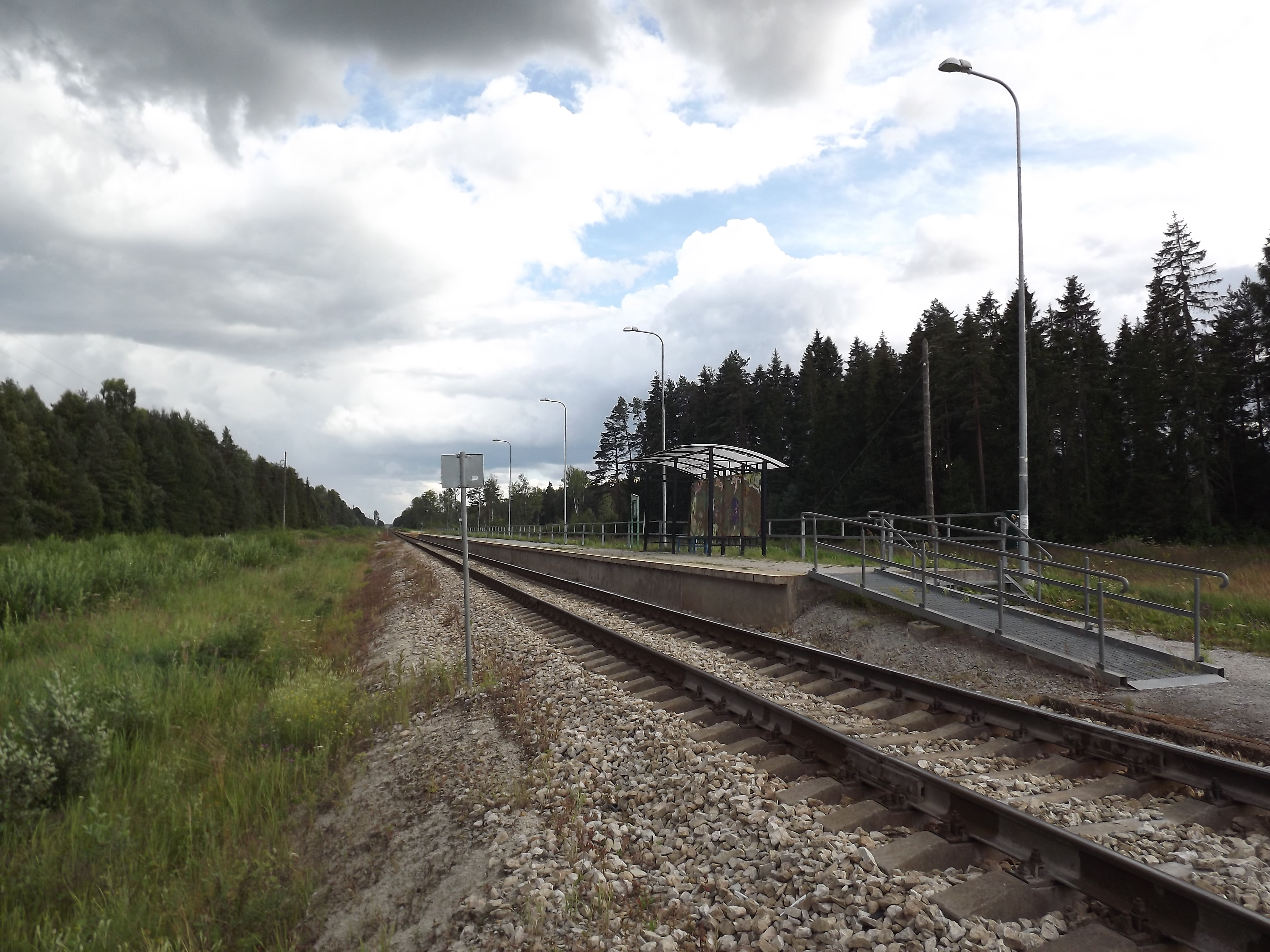 Vilivere raudteepeatus